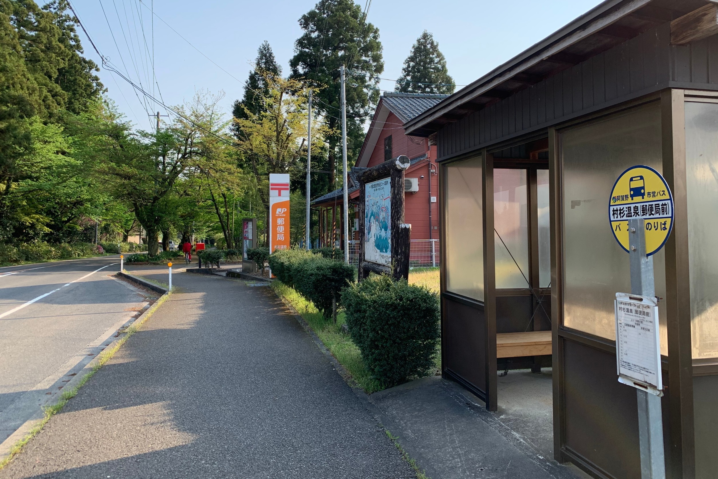 阿賀野市営バス 「村杉温泉」停留所（2020年5月）